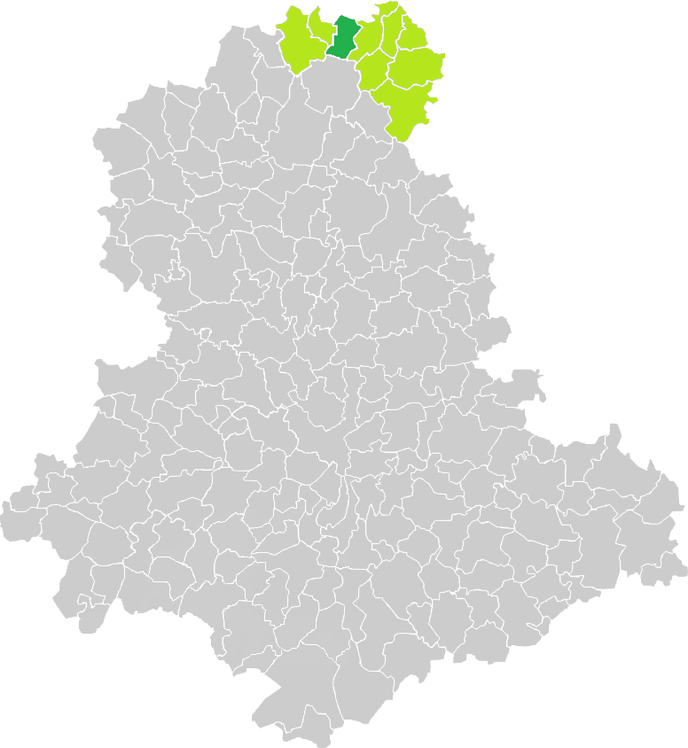 Carte de situation de la commune de Jouac (en vert foncé) dans le votre Canton (en vert clair) sur une carte des communes de la Haute-Vienne